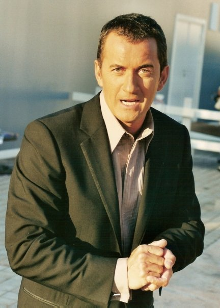 Christophe Dechavanne au festival de Cannes.